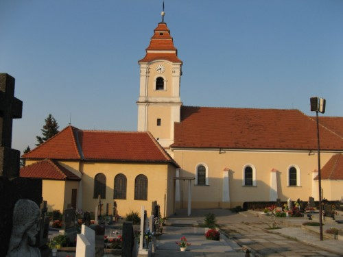 Kostol v Smolinskom